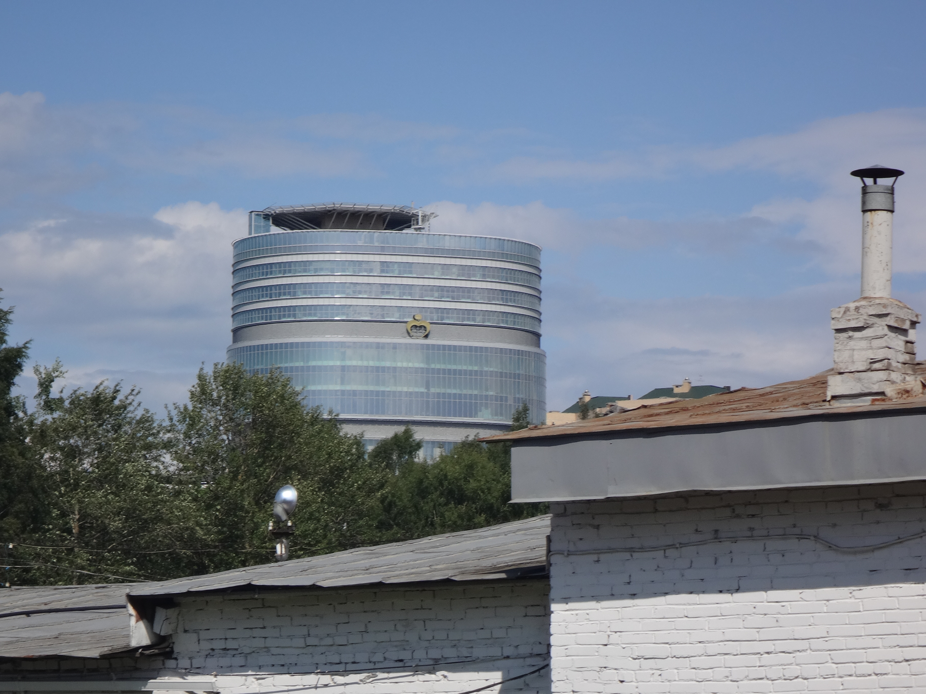 Вертолётная площадка на крыше здания